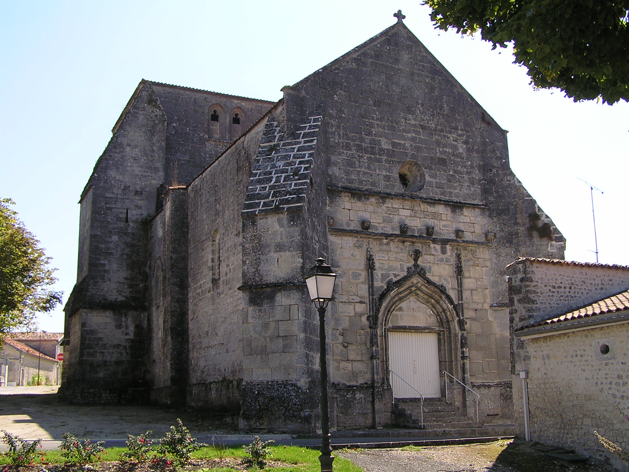 église de Malaville, Charente, France